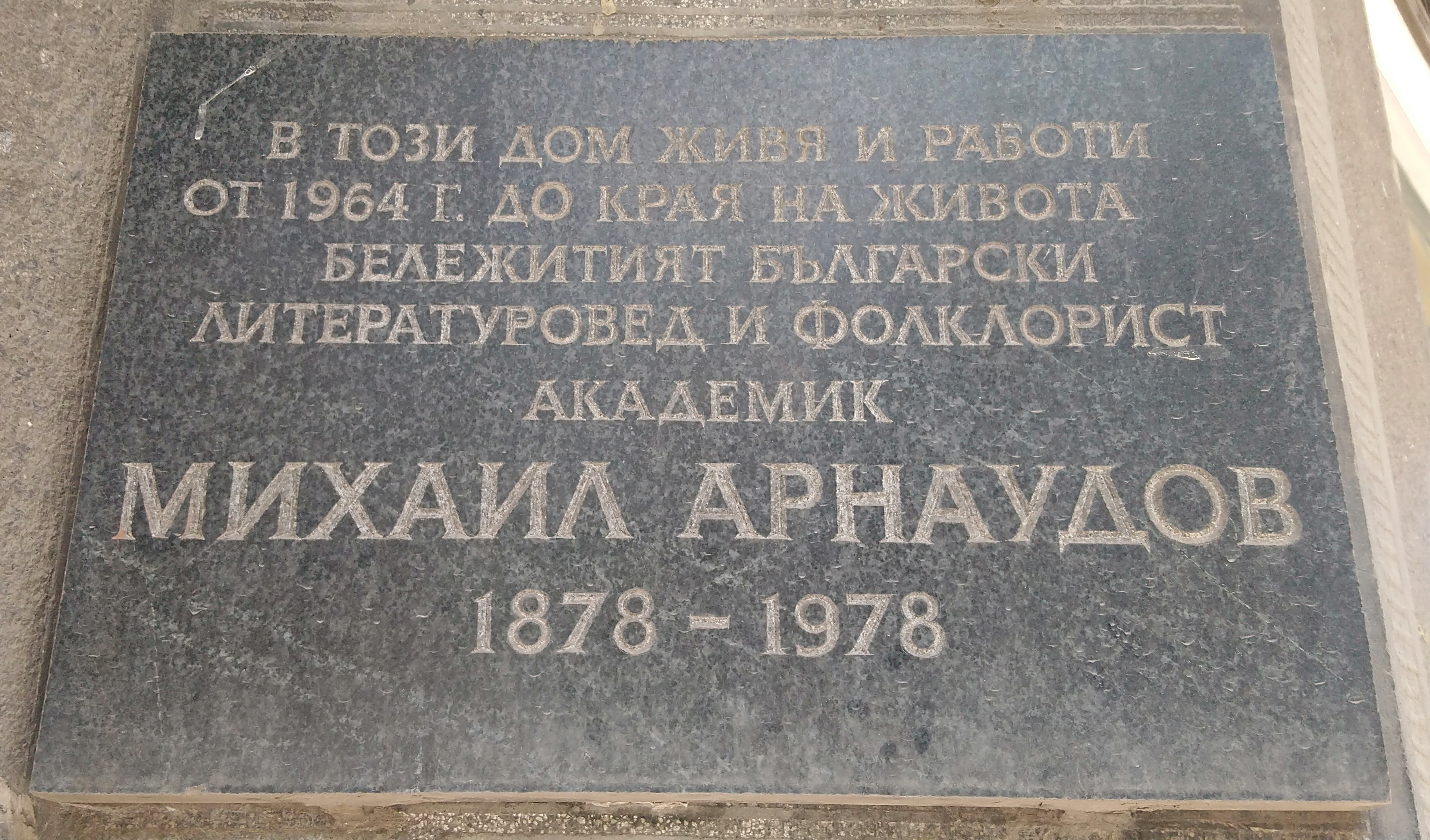 Mihail Arnaudov memorial plaque, 7 Slavyanska Str., Sofia